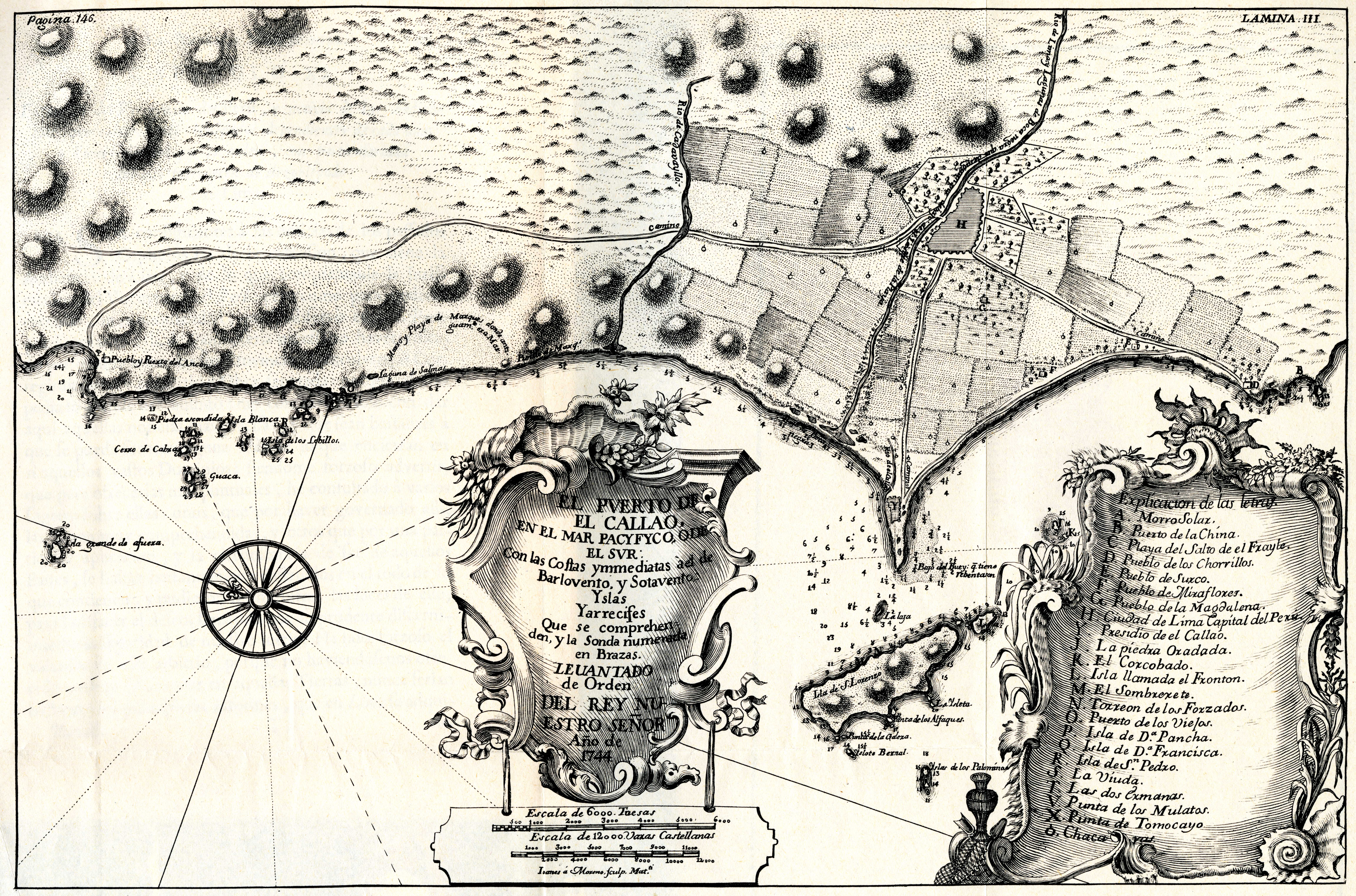 De Ulloa, Antonio y Jorge Juan. Relación Histórica del Viaje a la América Meridional, hecho de Orden de Su Majestad Católica para medir algunos Grados de Meridiano Terrestre, y venir por ellos en conocimiento de la verdadera Figura y Magnitud de la Tierra, con otras varias Observaciones Astronómicas y Físicas. Por Don Jorge Juan Comendador de Aliaga, en la Orden de San Juan, Socio correspondiente de la Real Academia de las Ciencias de París y Don Antonio de Ulloa de la Real Sociedad de Londres: ambos Capitanes de Fragata de la Real Armada. Segunda Parte / Tomo II. Impresa por la Orden del Rey Nuestro Señor en Madrid por Antonio Marín, Año de MCDDXLVIII (1748). Diapositiva de Consulta y acceso publico cuya información fue investigada de un libro y/o ejemplar de revisión custodiado en los Fondos Bibliográficos (Sección Siglo XVIII o Etapa Colonial) del Archivo Histórico del Guayas; Guayaquil, Ecuador